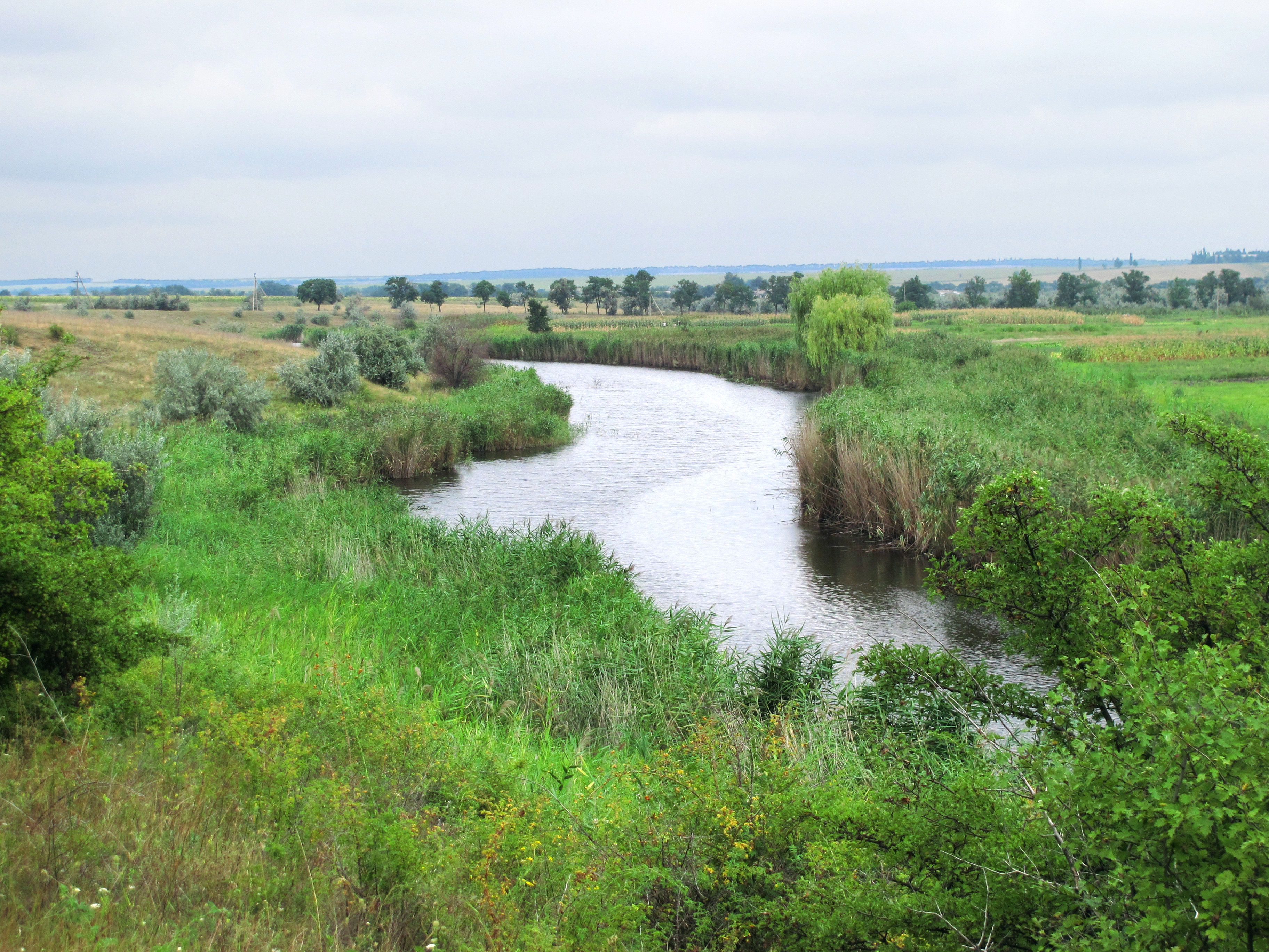 Річка Янчур. Заповідна ділянка русла й долини.